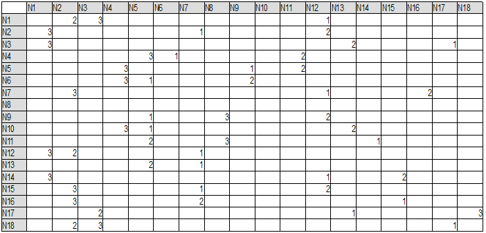 Blockmodellanalyse Schritt1: Dateneingabe